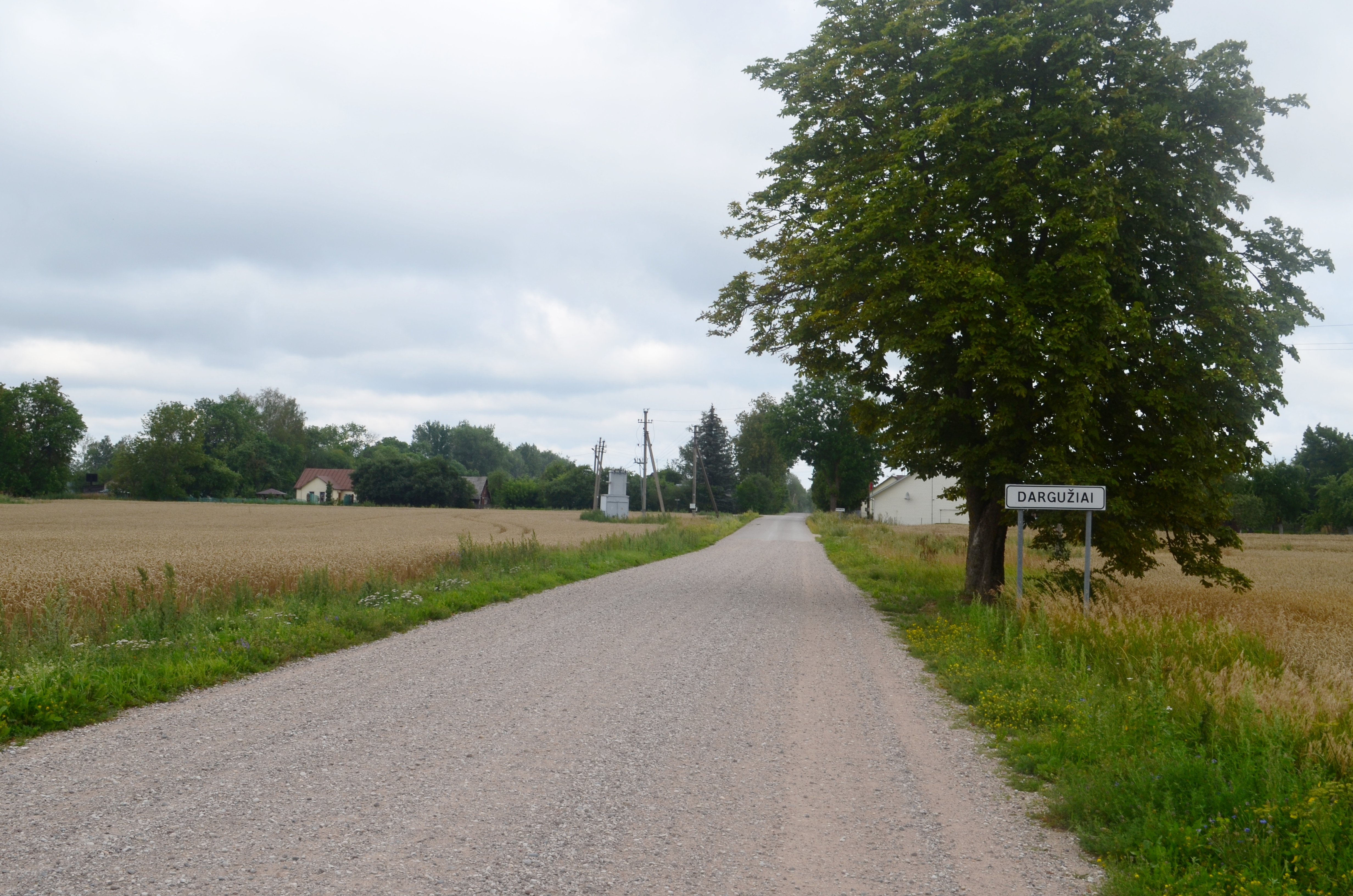 Dargužiai, Jonavos raj.